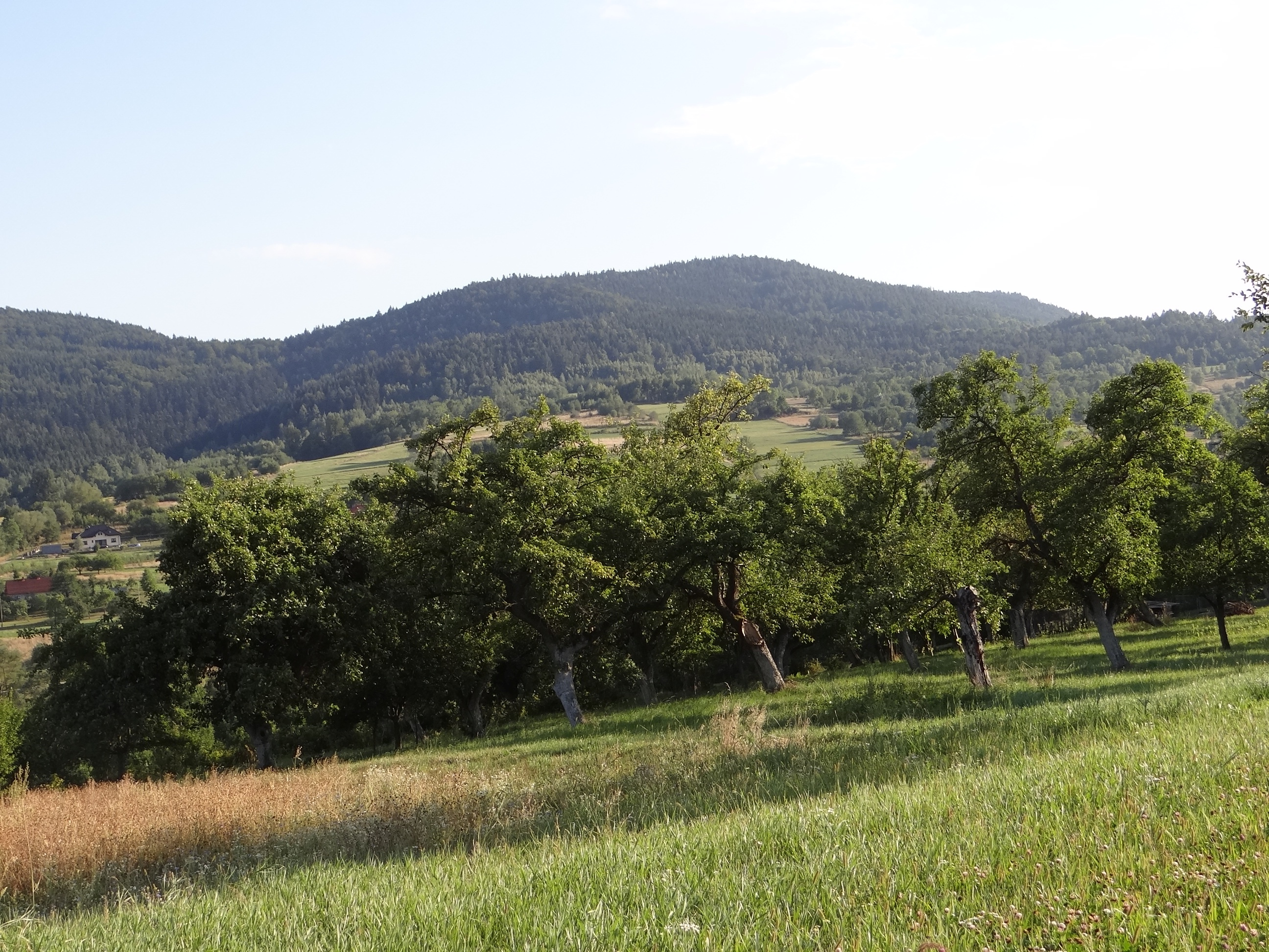 Żurawnica i przełęcz Carchel, widok ze Śleszowic